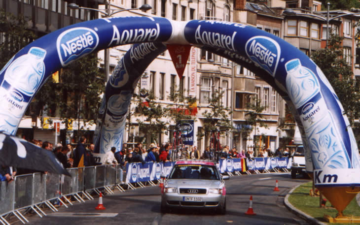 Beschreibung: "La flamme rouge" - das Zeichen für den letzten Kilometer bei der Tour de France Quelle: fotografiert am 3. Juli 2004 in Lüttich Fotograf: Denkfabrikant Lizenzstatus: GNU FDL